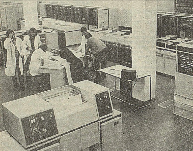 ICL system 4, ZIPO, Trójmiasto-Przymorze